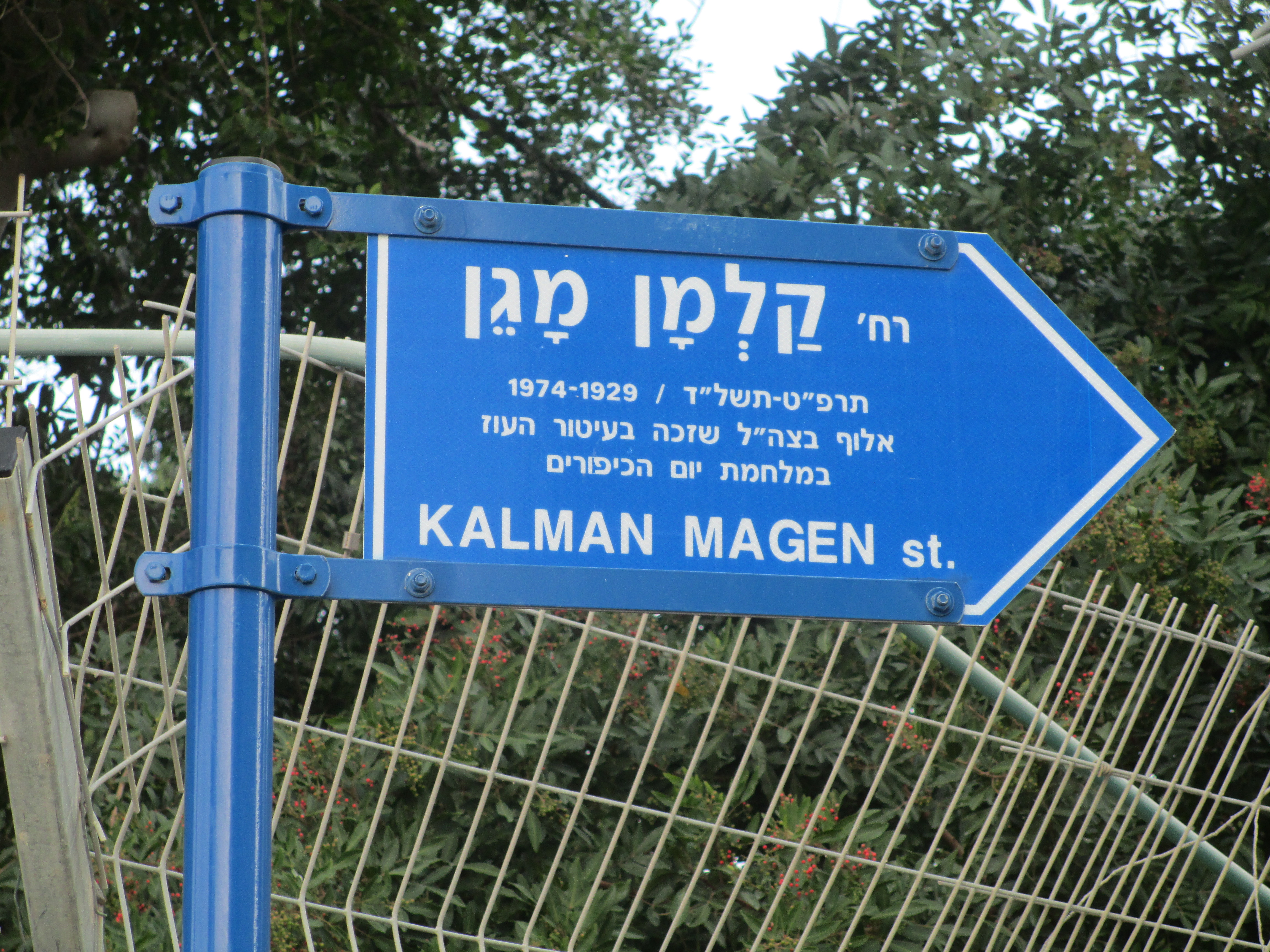 רחוב קלמן מגן בתל אביב